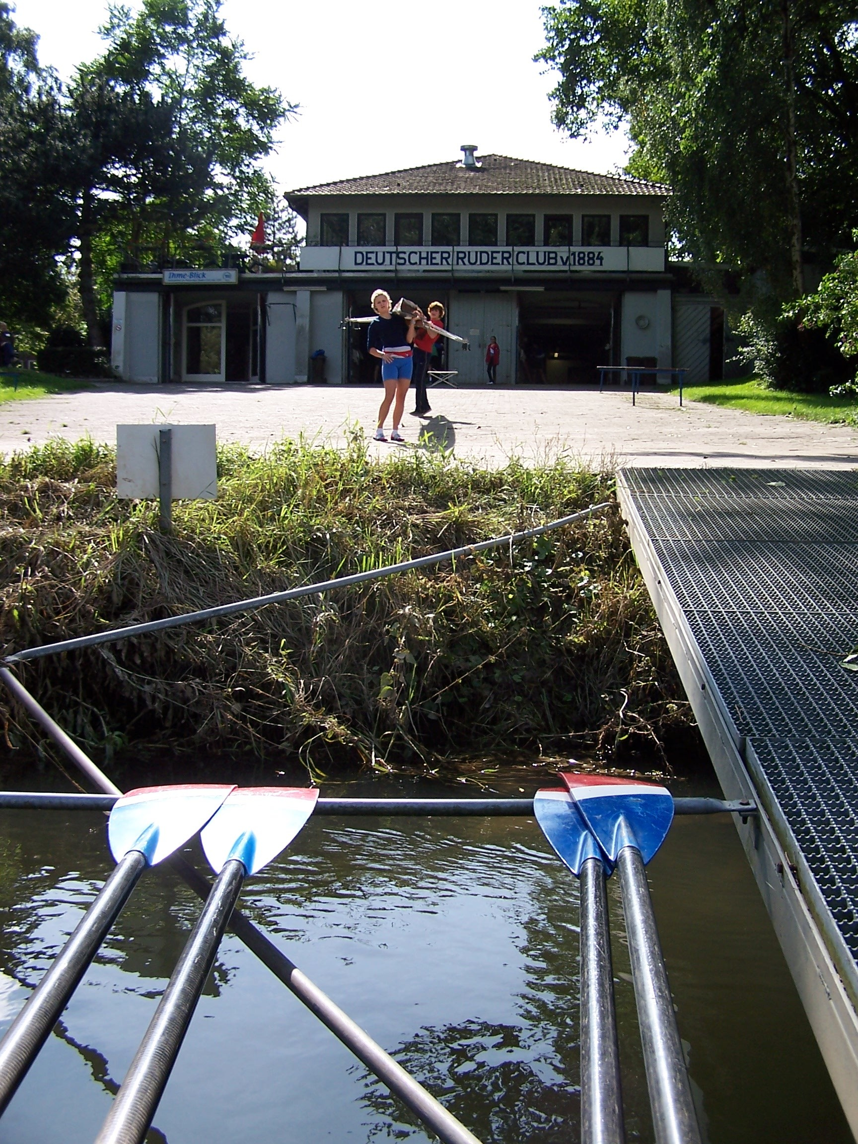 Bootshaus des Deutschen Ruder-Clubs von 1884 e.V. Hannover an der Ihme